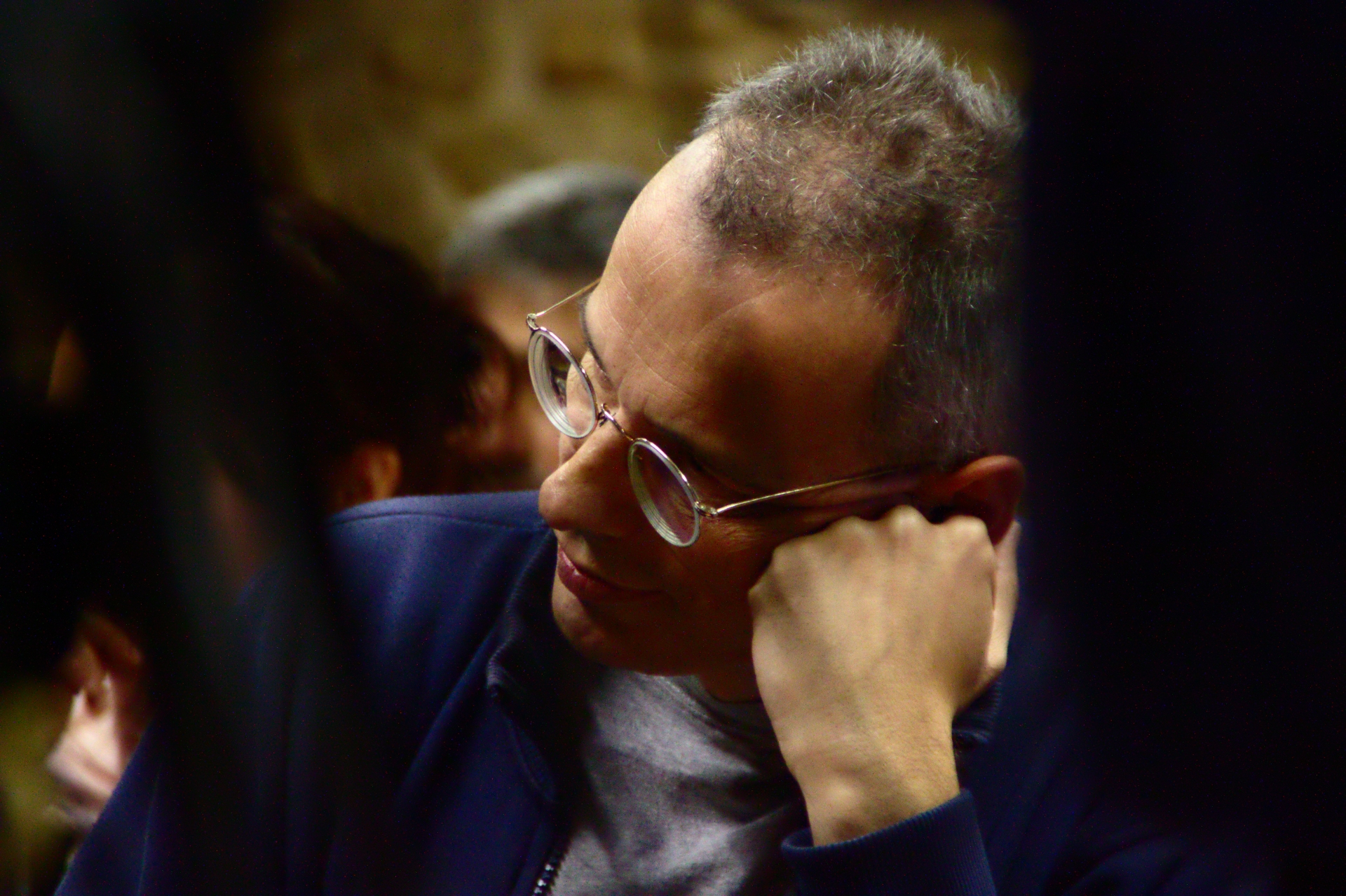 Xabier Montoia idazle eta musikari gasteiztarra, 2010ean.